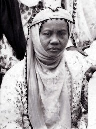 Siti Munjiyah adalah salah satu tokoh Aisyiyah yang lahir di Kampung Kauman, Kelurahan Ngupasan, Kecamatan Gondomanan, Provinsi Daerah Istimewa Yogyakarta pada tahun 1896. Dia meninggal pada tahun 1955 dan dimakamkan di Permakaman Kauman yang berada di belakang Masjid Gedhe Kauman.